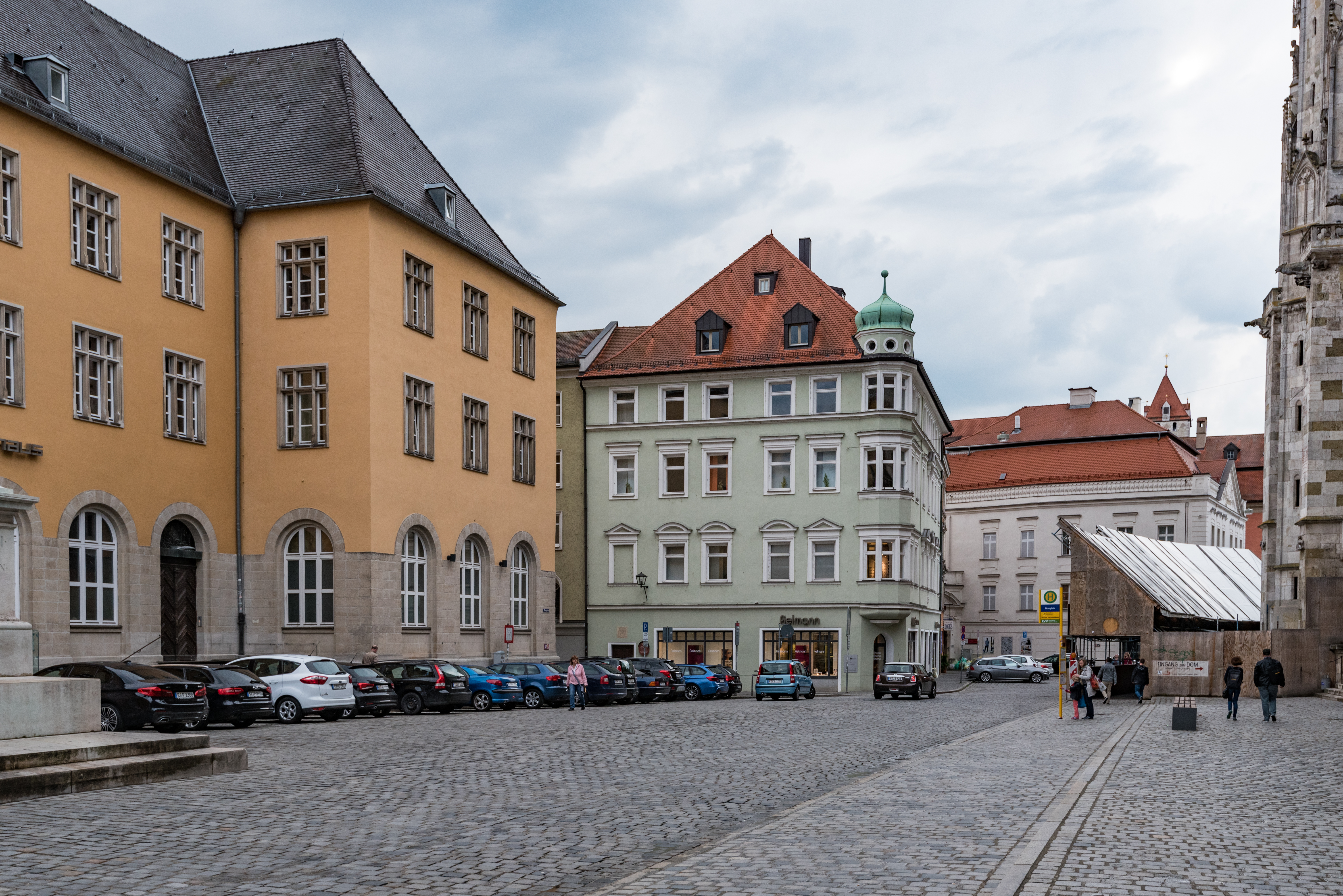 Regensburg, Domplatz 4